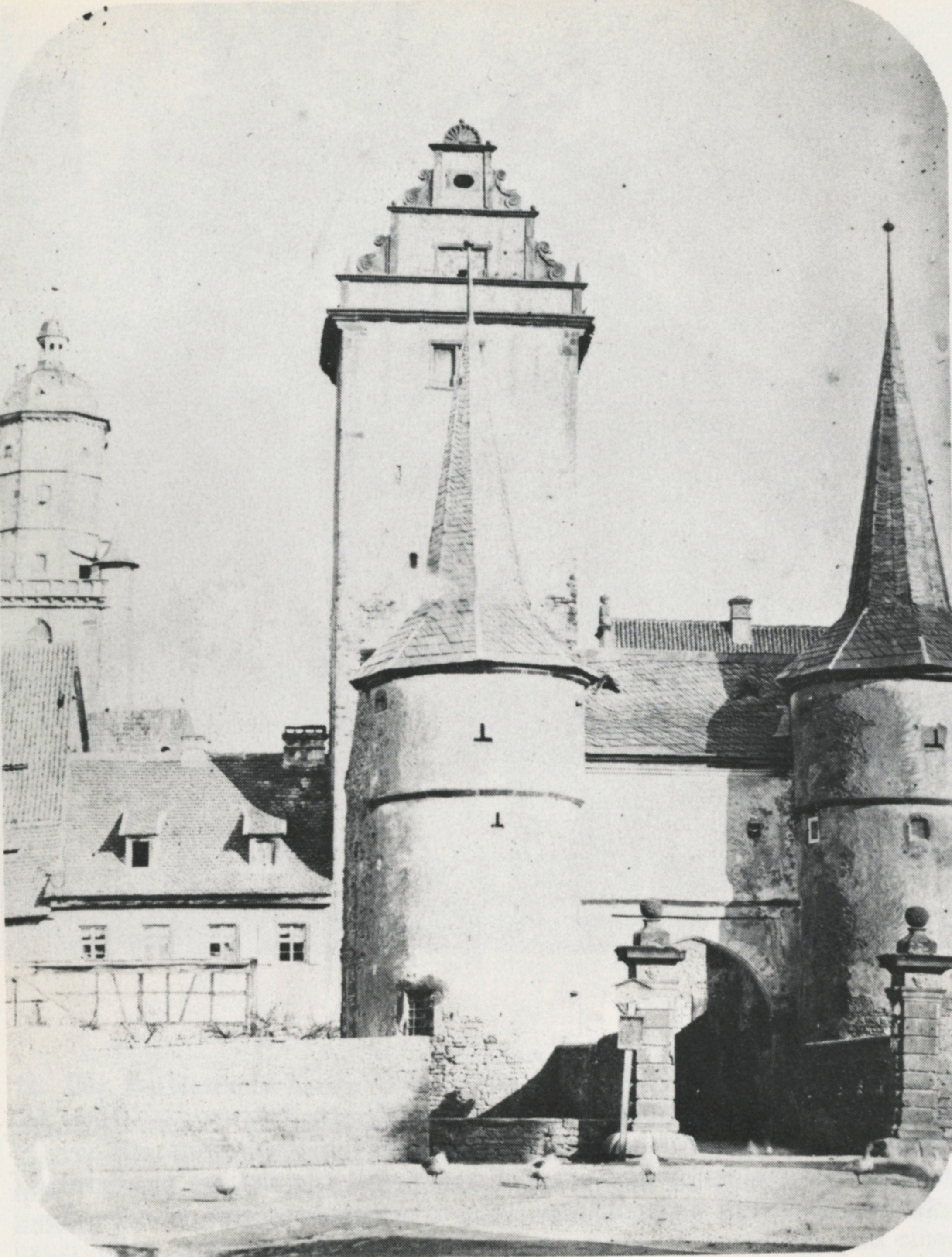 Fotografie des Oberen (Sommeracher) Tores in Volkach, dahinter die Altstadt und die Bartholomäuskirche. Das doppeltürmige Vorwerk ist noch vorhanden, vor 1871. Links das heutige Haus Oberer Markt 1.